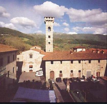 Badia di san salvatore